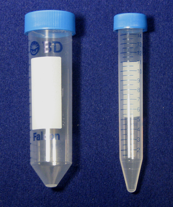 Falcon tubes. For 50 and 15ml. "Falkonki" na 50 i 15ml.